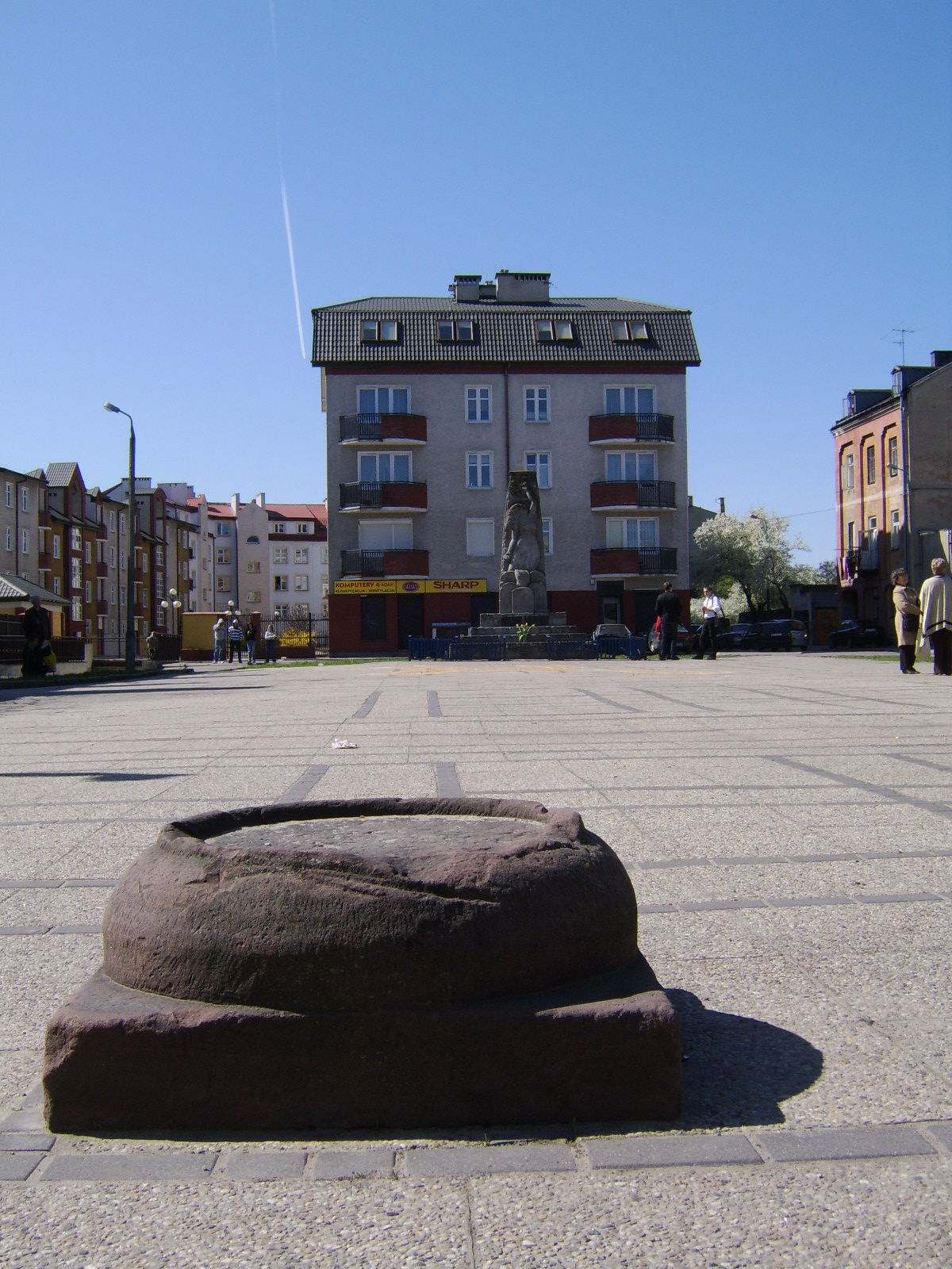 Radom, plac po synagodze przy ulicy Bóżniczej, w tle pomnik upamiętniający radomskich Żydów.